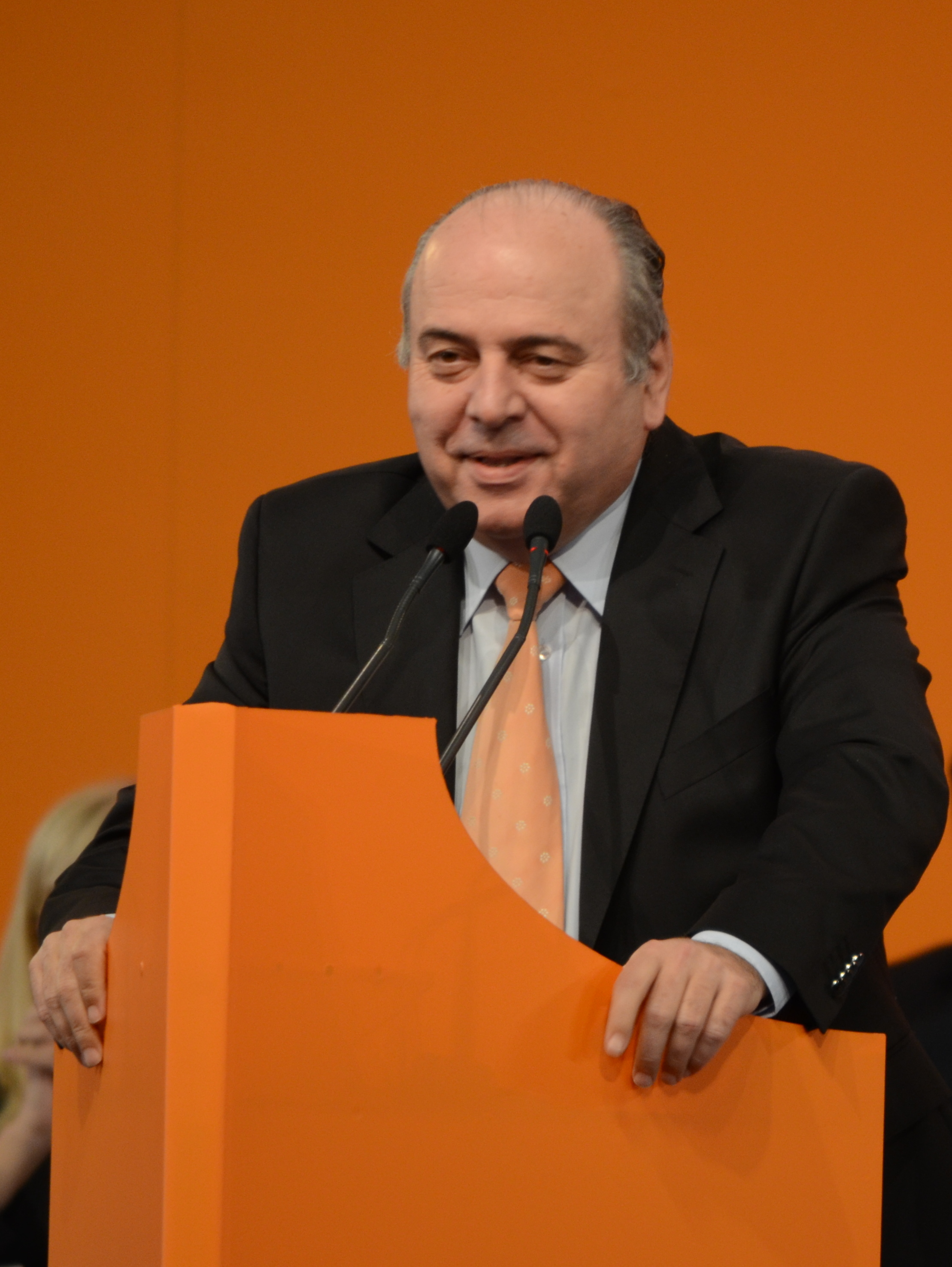 Gheorghe Ștefan (la Convenția națională extraordinară a Partidului Democrat-Liberal, 23 martie 2013)